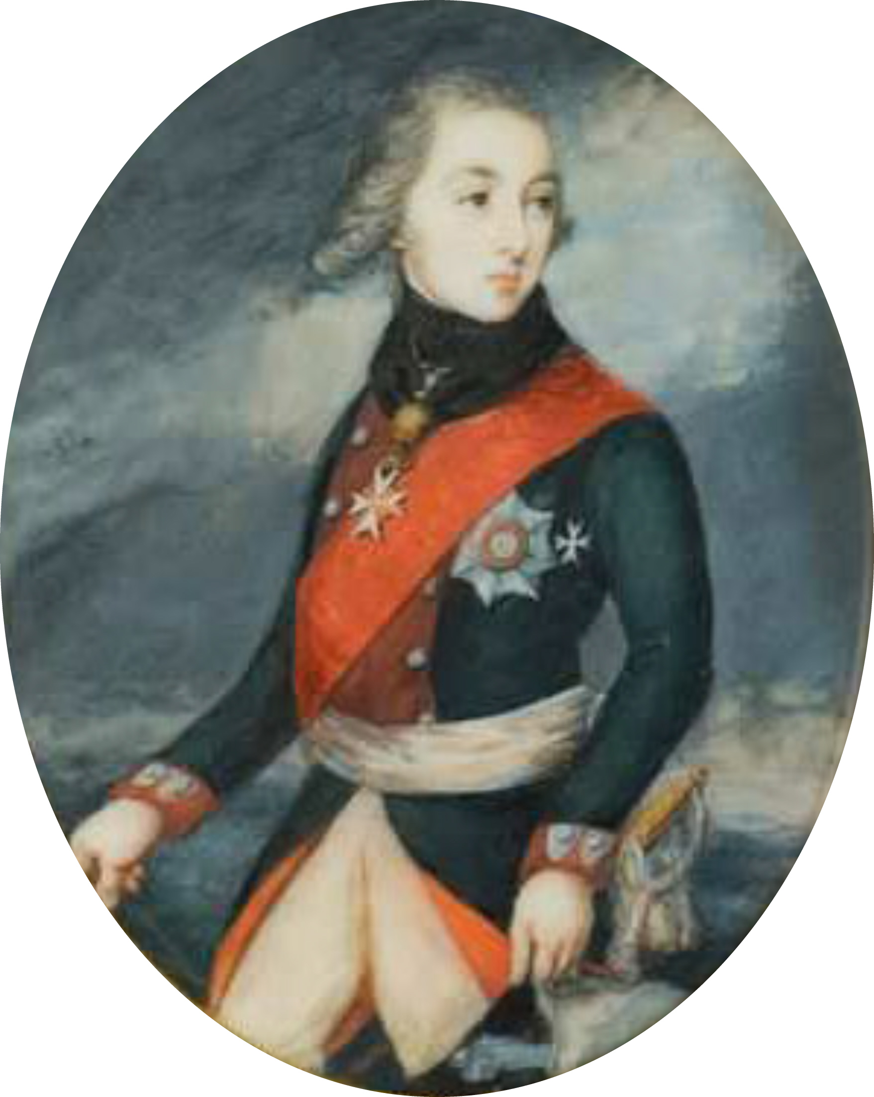 Karl August Christian, Herzog zu Mecklenburg(-Schwerin) (* 2. Juli 1782 in Ludwigslust; † 22. Mai 1833 ebenda) in russischer Uniform; Porträtminiatur